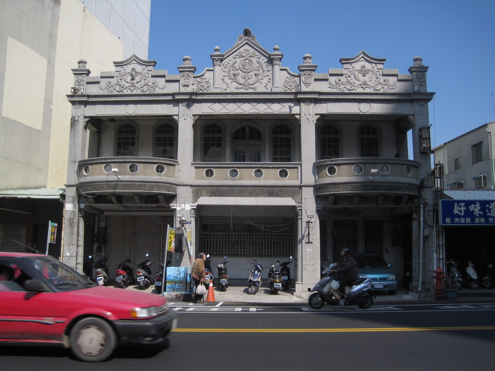 臺南東門美術館舊址，許嵩煙舊宅。